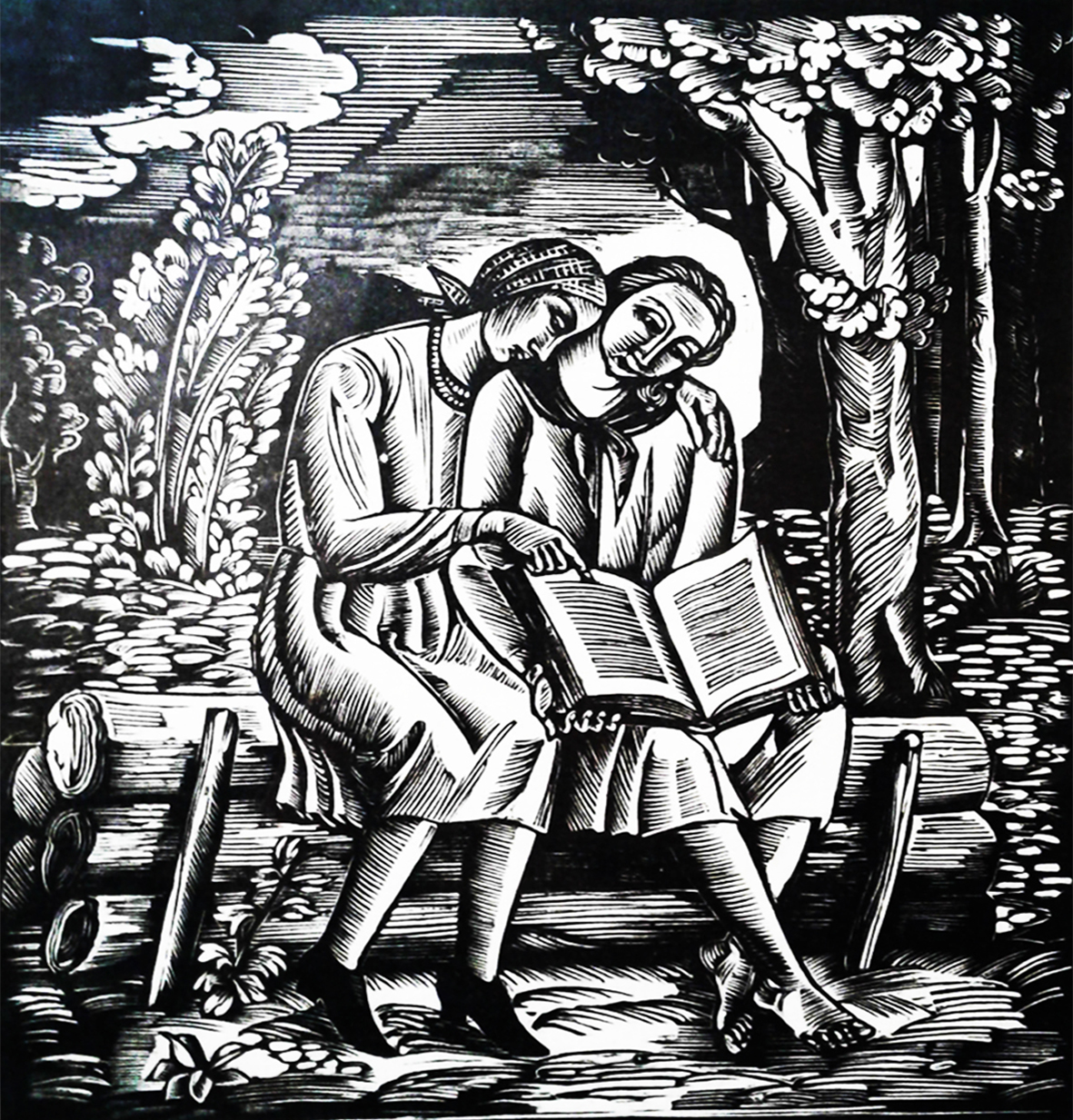 Налепинська-Бойчук Софія Олександрівна «Дівчата з книжкою». Папір, дереворит. 1927 Національний художній музей України